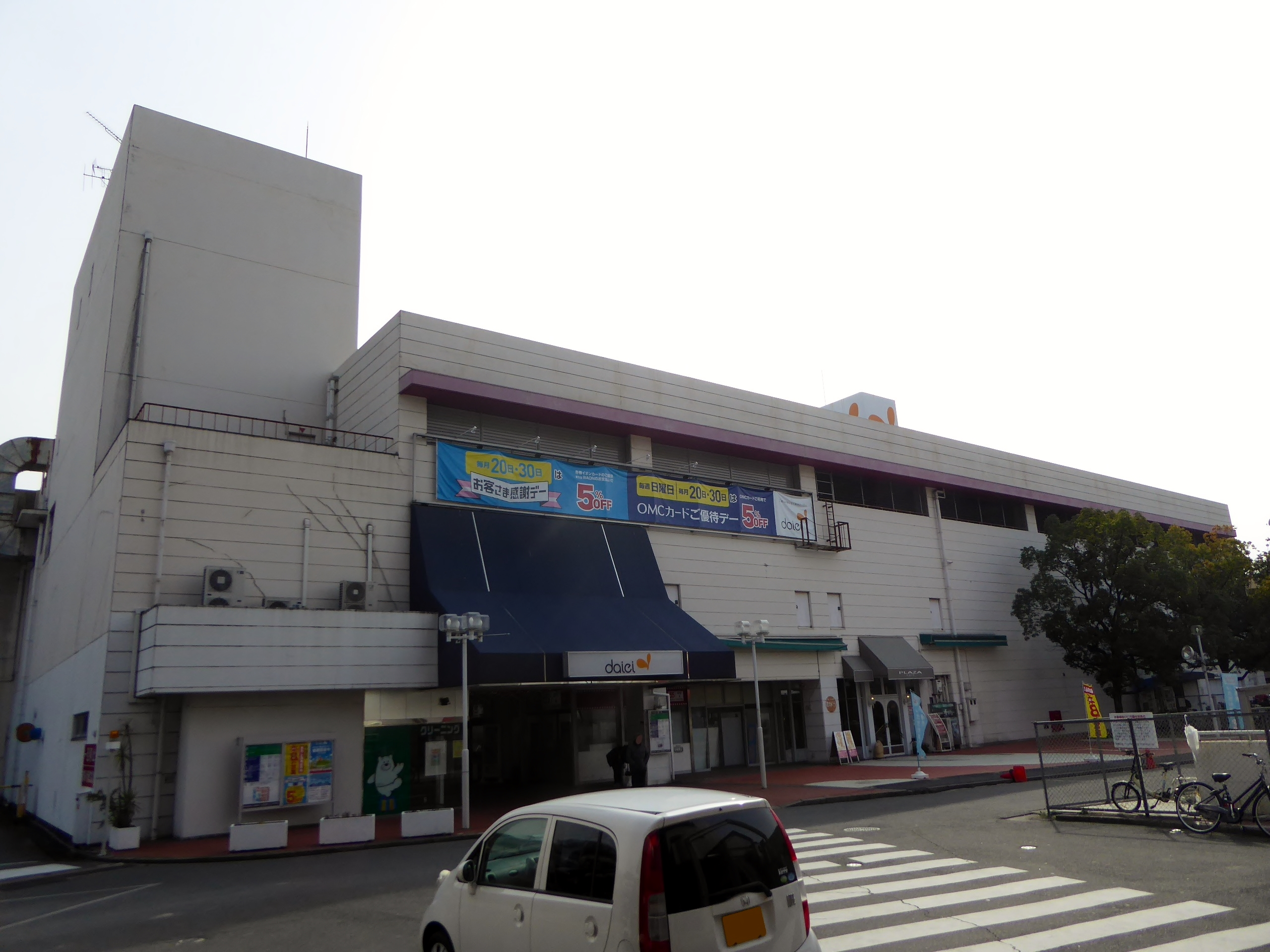 2016年2月5日時点のダイエー富雄店を撮影。